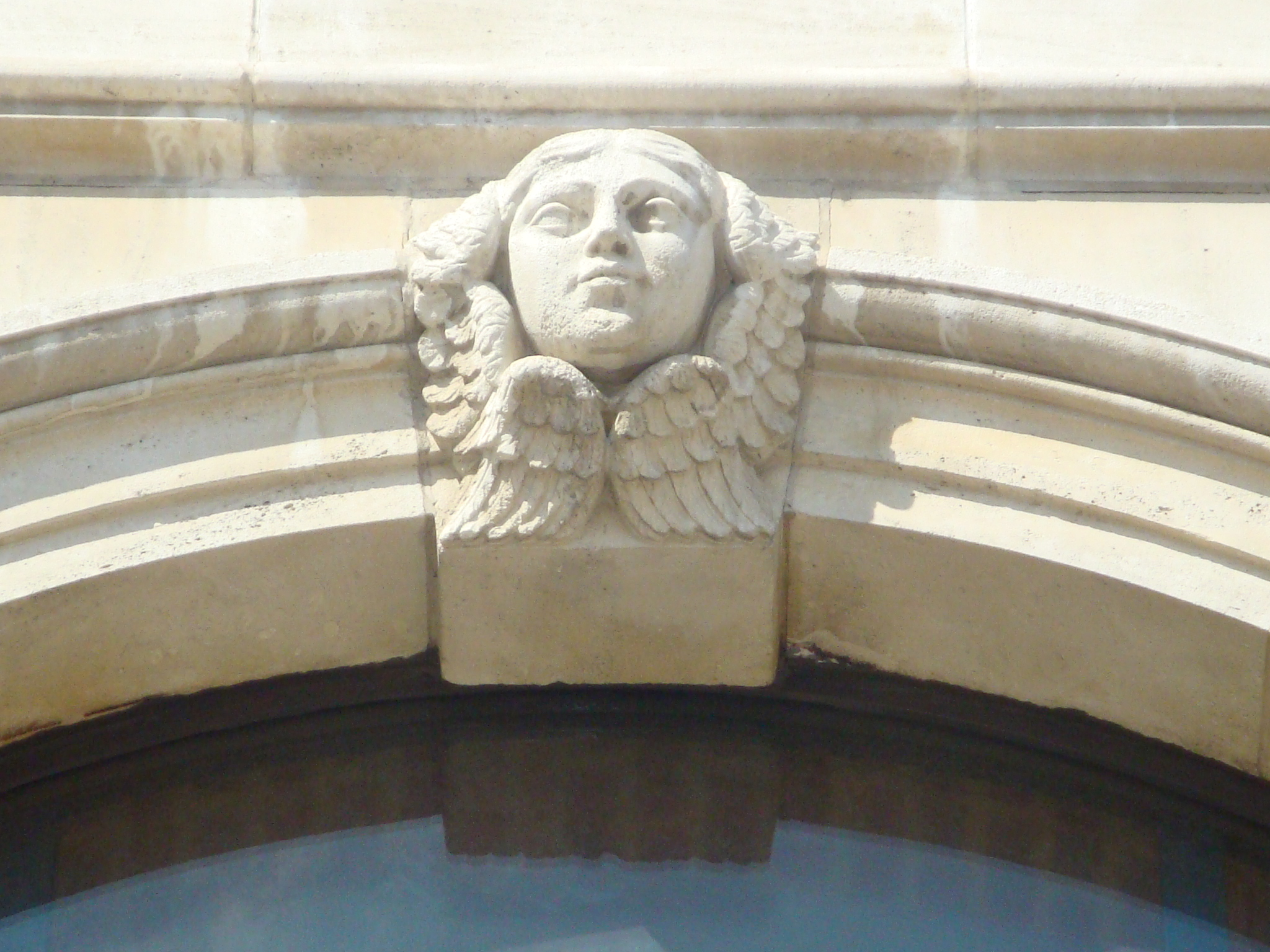 Chapelle de la Resurrection, Bruxelles Détail de la façade